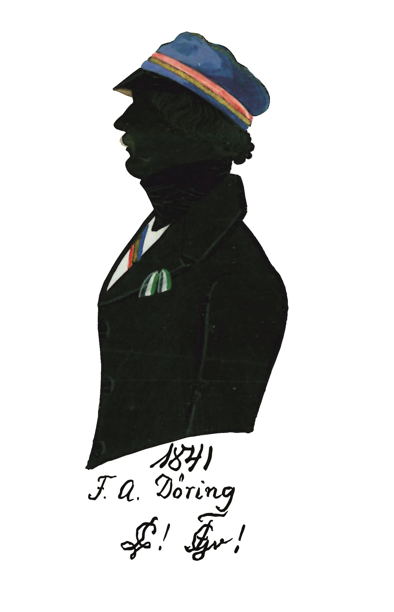 kolorierte Silhouette des Corpsstudenten Friedrich Doering